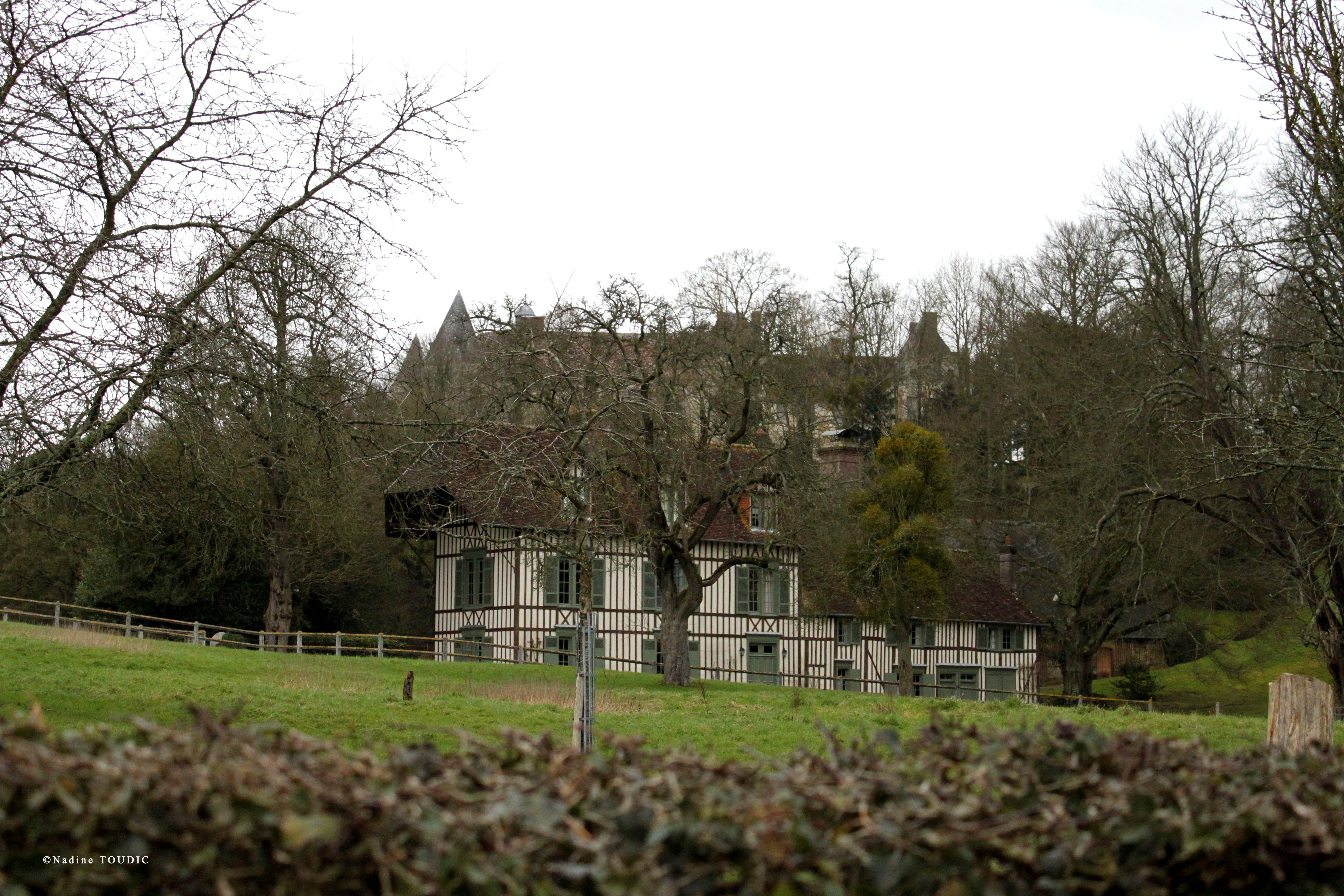 Centre de la commune